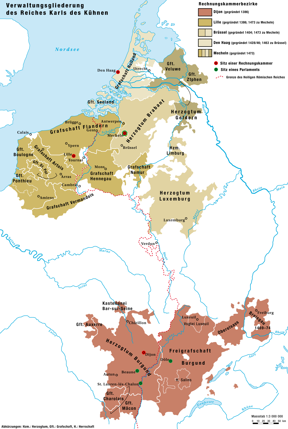 Die Verwaltungsgliederung des Herrschaftsgebietes des Hauses Burgund unter Karl I., «dem Kühnen» 1465/67–1477